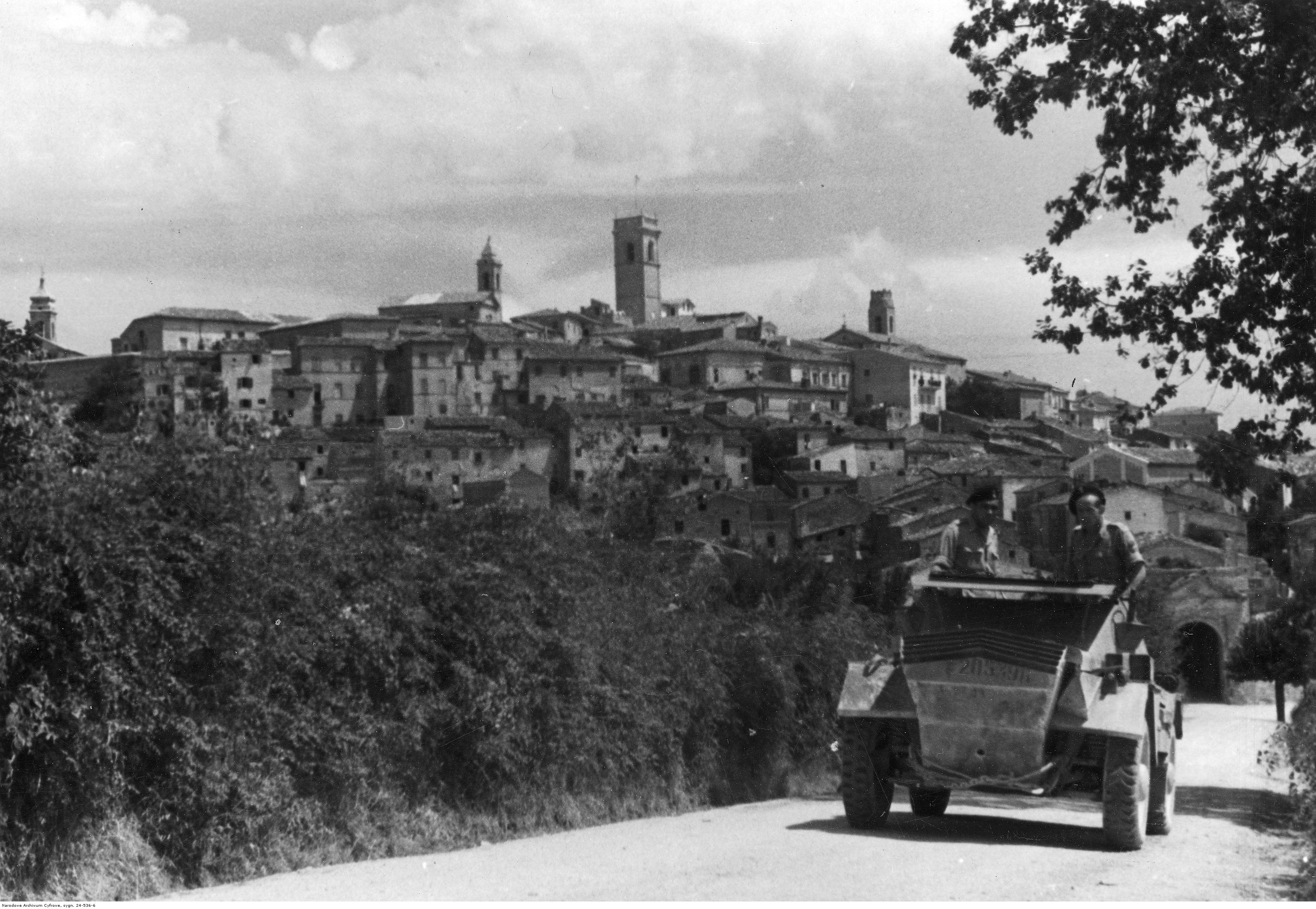 Sprzęt ciężki 2 Warszawskiej Dywizji Pancernej. Samochód rozpoznawczy Daimler Scout Car (Dingo) z 4 Pułku Pancernego "Skorpion"; Recanati (k. Ankony). Archiwum Fotograficzne Tadeusza Szumańskiego. Sygnatura: 24-536-6